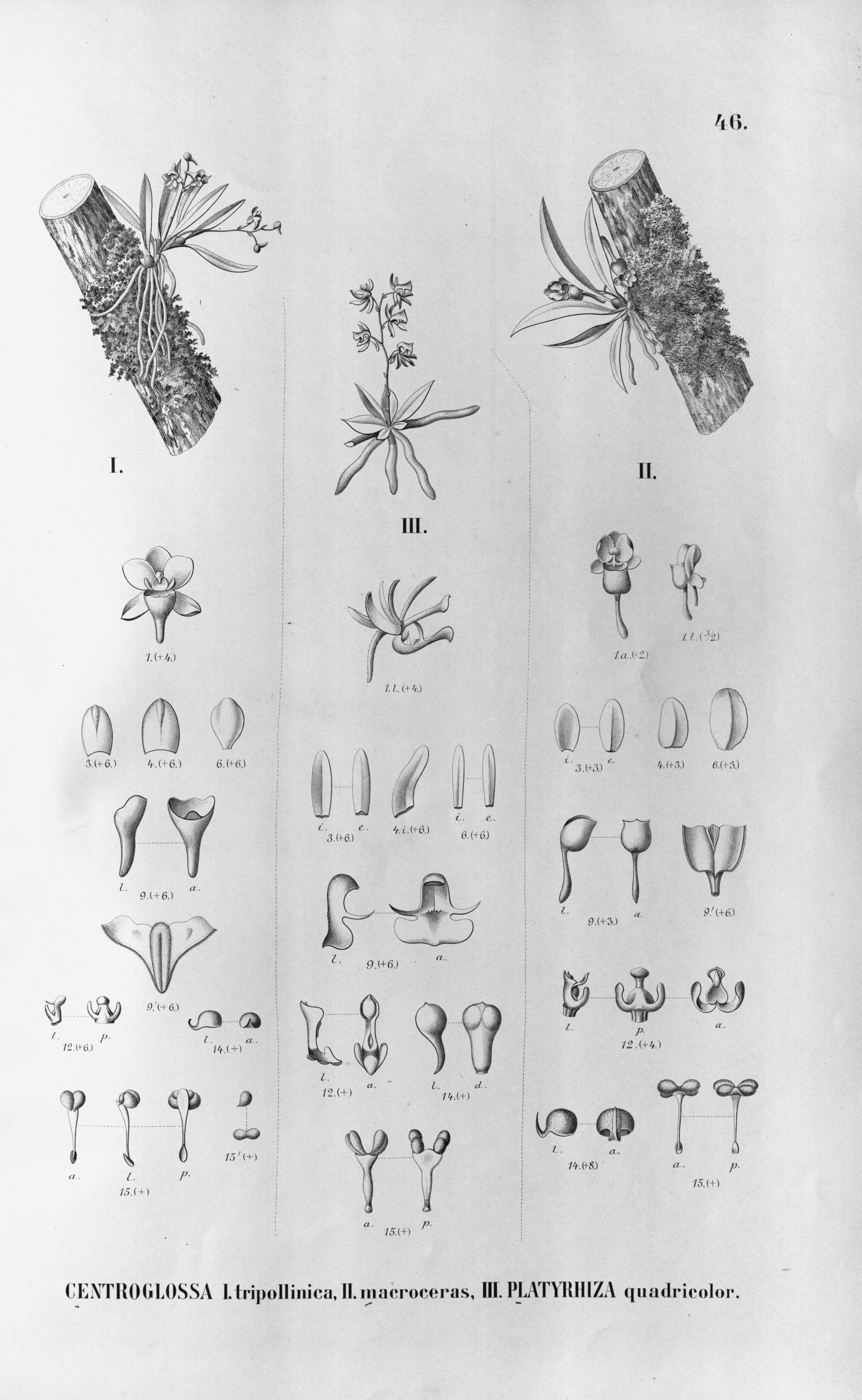 I. Centroglossa tripollinica II. Centroglossa macroceras III. Platyrhiza quadricolor